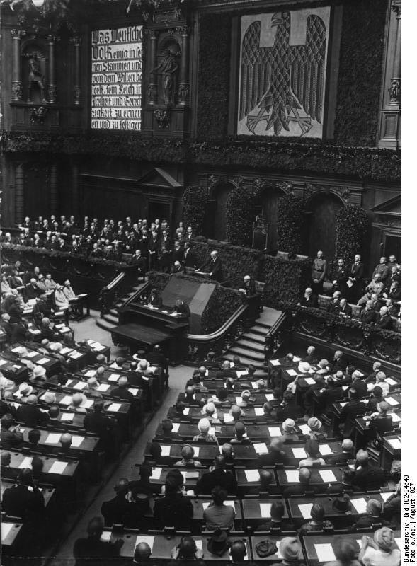 Die grossen Verfassungsfeiern unter Anwesenheit des Reichspräsidenten von Hindenburg sowie der gesamten Reichs- und Staatsregierung im Reichstag und auf dem Platz der Republik! Blick in den festlich geschmückten Plenarsitzungssaal des Reichstages mit dem Reichsadler und dem Sinnspruch während der Verfassungsfeier. Der Abgeordnet von Kardorff hält die Festrede.